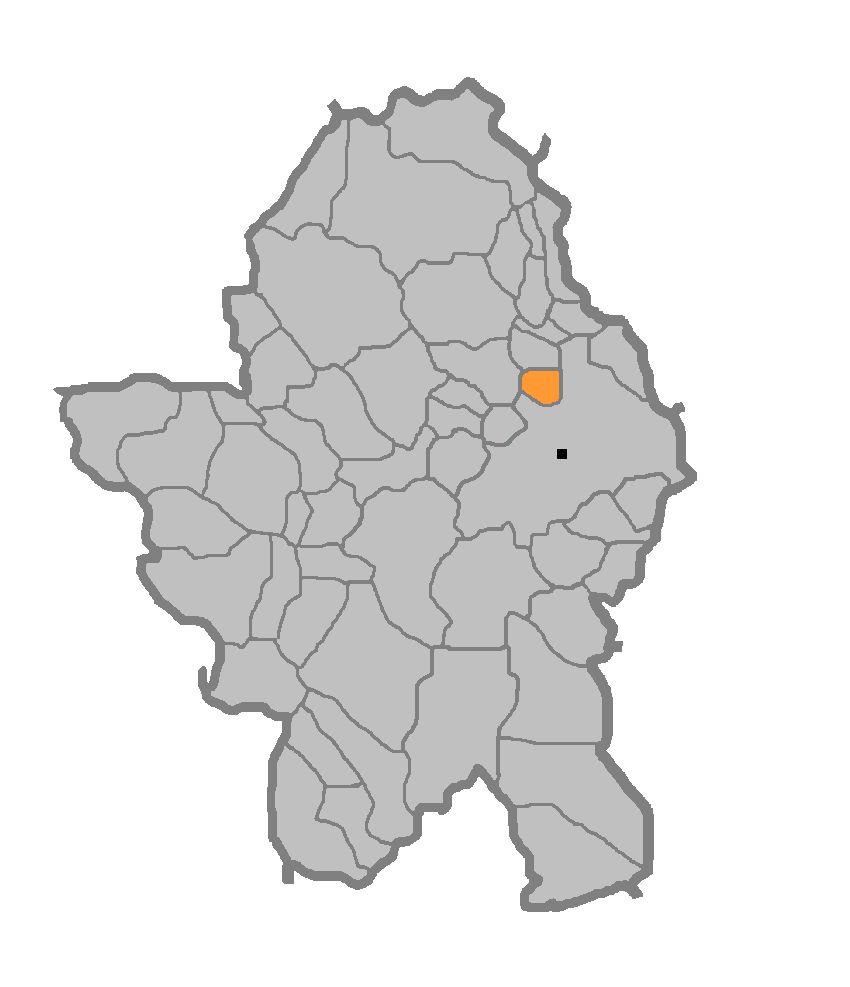 Мјесна заједница Дракулић